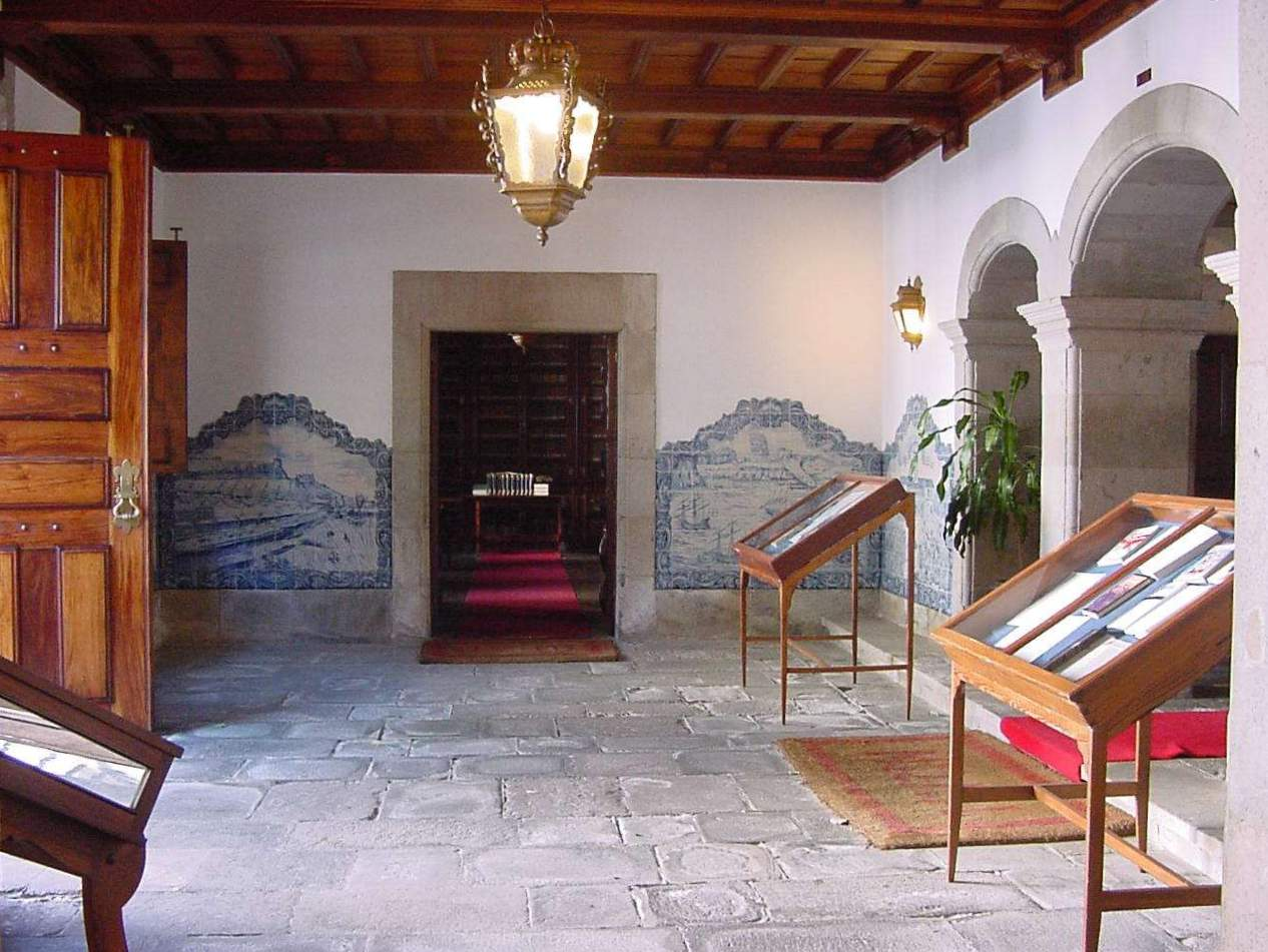 Palácio Bettencourt, Átrio, ilha terceira, Açores, Portugal.